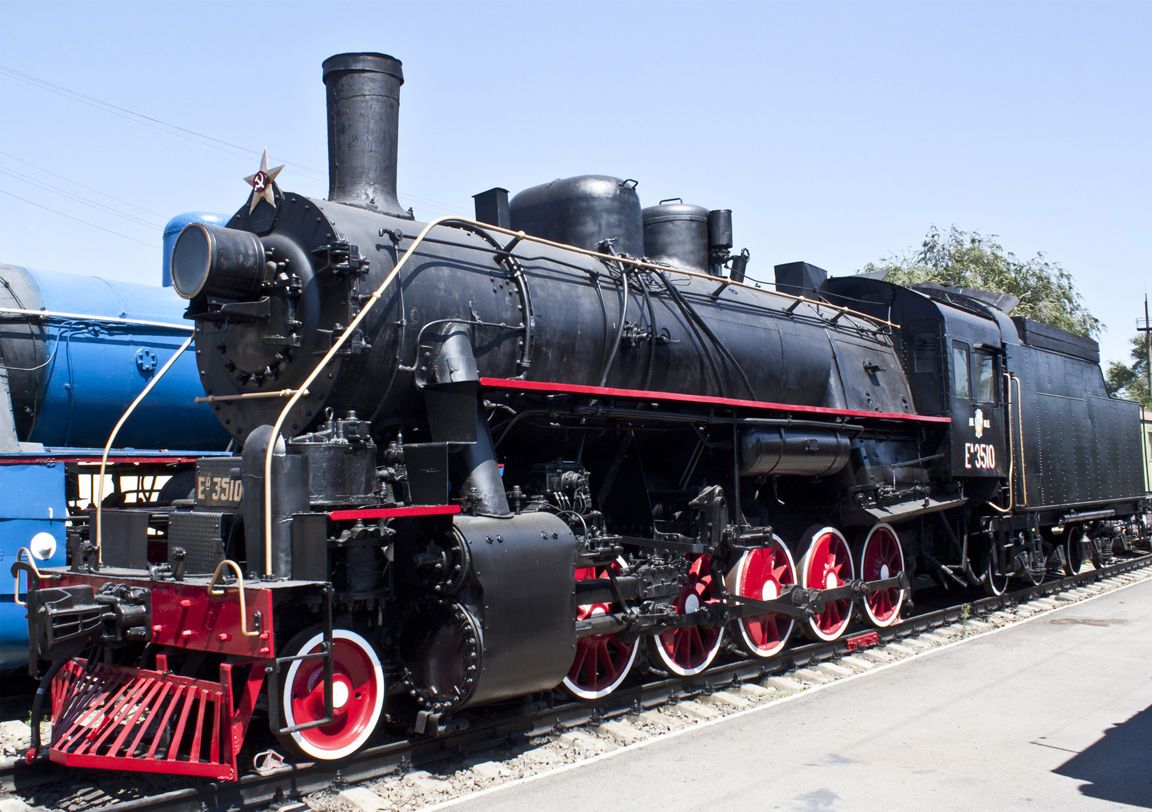 Паровоз построен в 1945 году заводом АЛКО, США